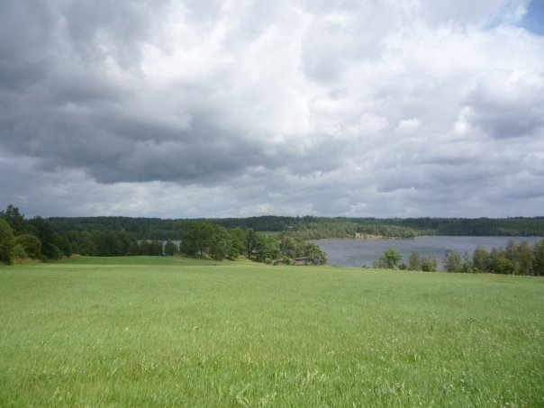 Sjön Sävens norra del ligger i Vårgårda kommun.